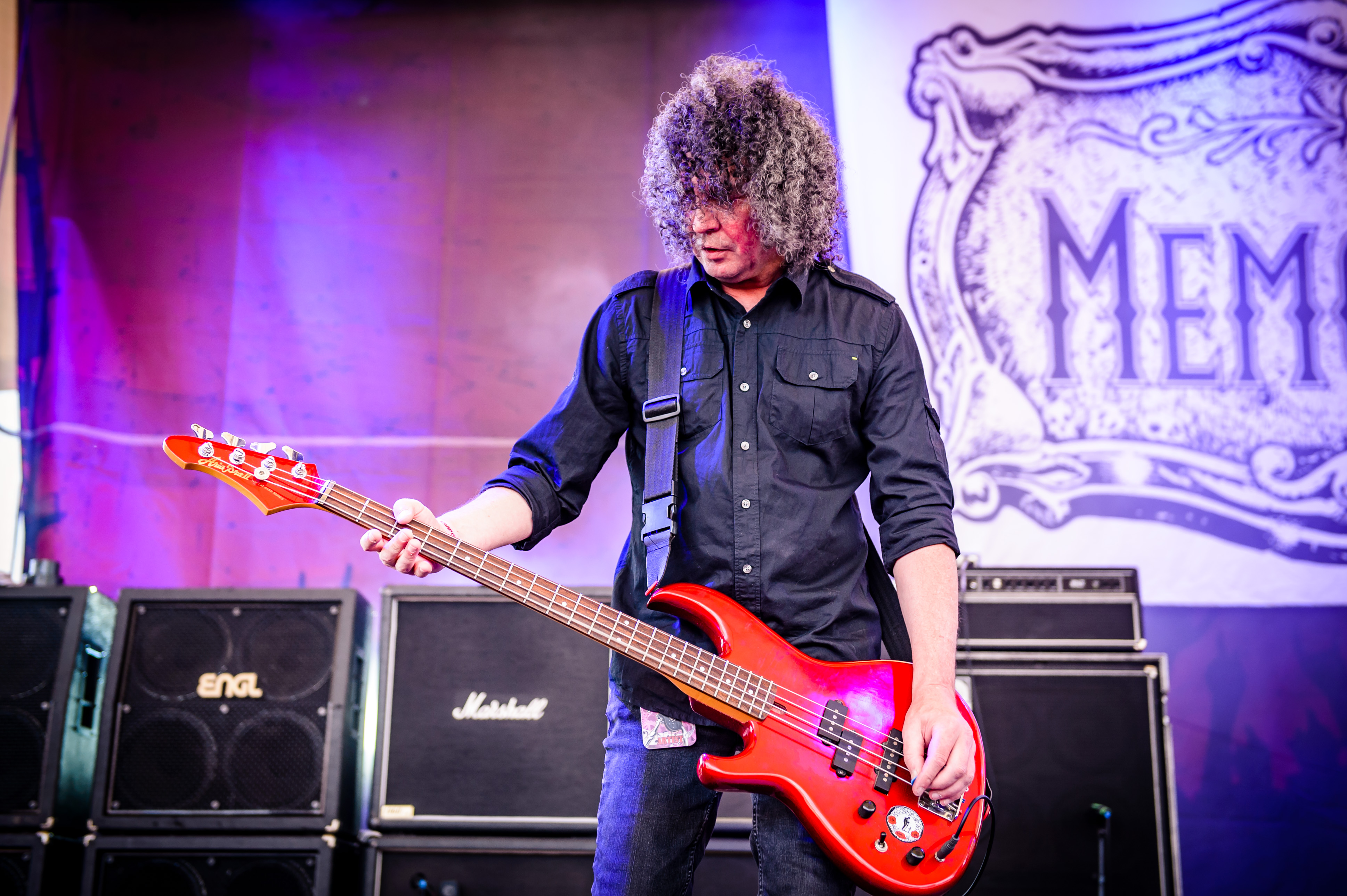 'Rock Hard Festival 2018; Amphitheater Gelsenkirchen': 'Memoriam'